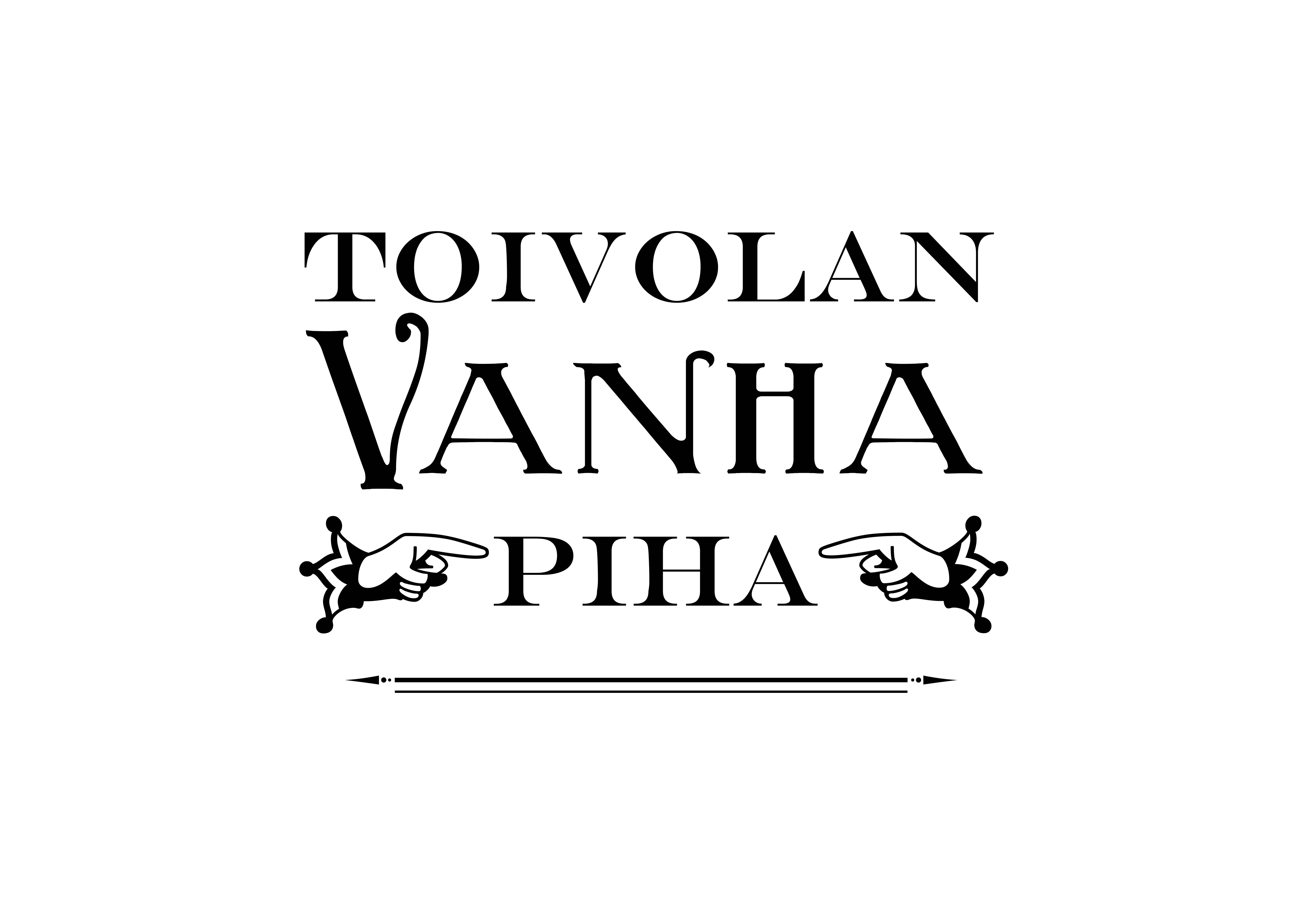 Toivolan Vanha Piha, logo